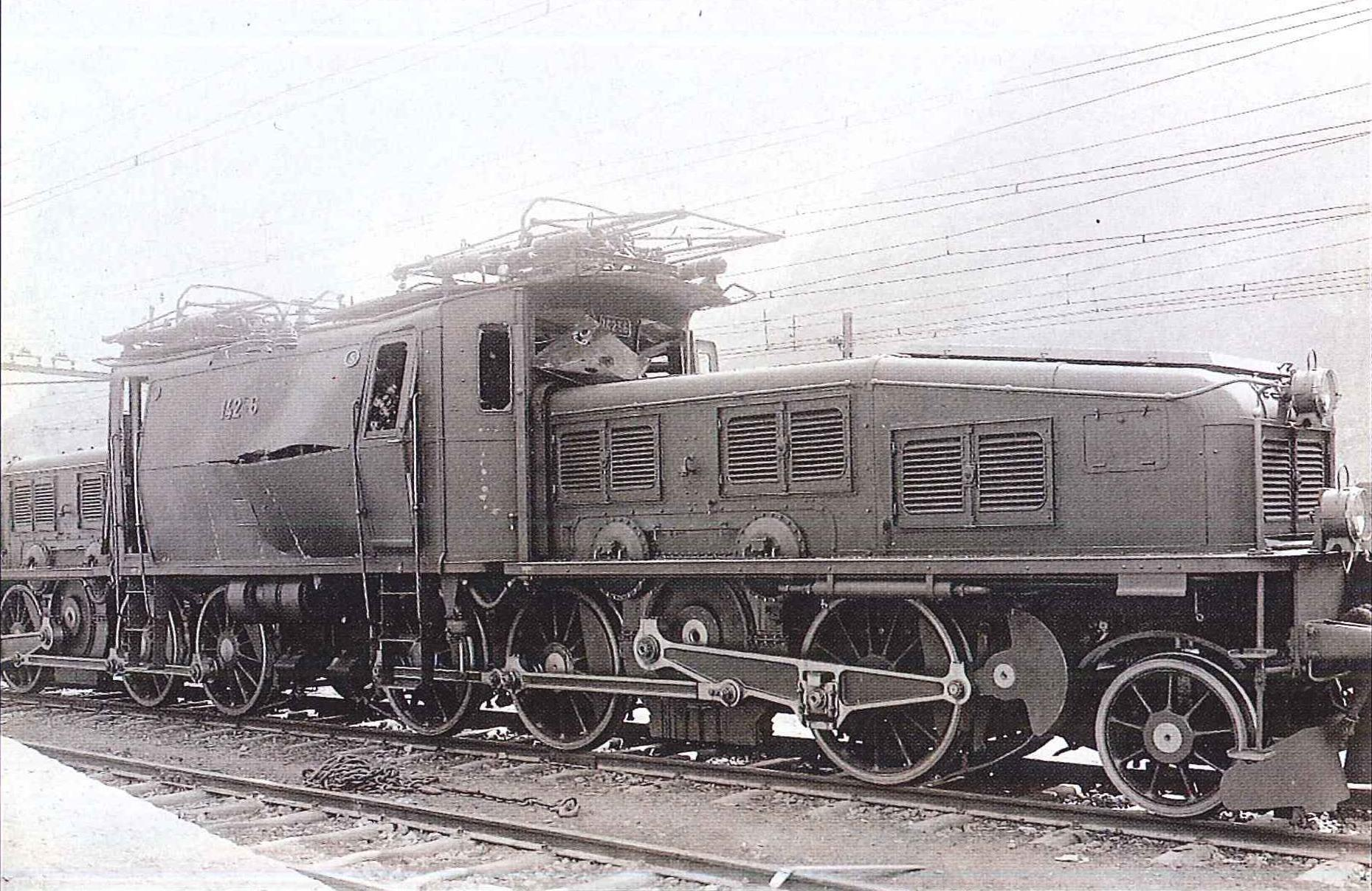 Am 2. April 1923 explodierte in Lavorgo der Transformator der SBB Ce 6/8 II 14256. Der Führergehilfe wurde dabei getötet, der Lokomotivführer verletzt.